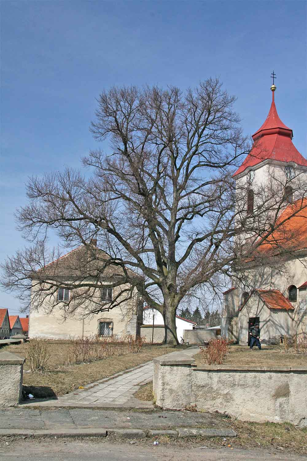 Památná lípa malolistá u kostela Svatého Prokopa v Žiželicích